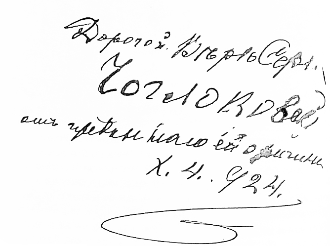 Дарственная надпись А. Ф. Кони на своей фотографии, подаренной В. С. Чоглоковой в 1924 г.